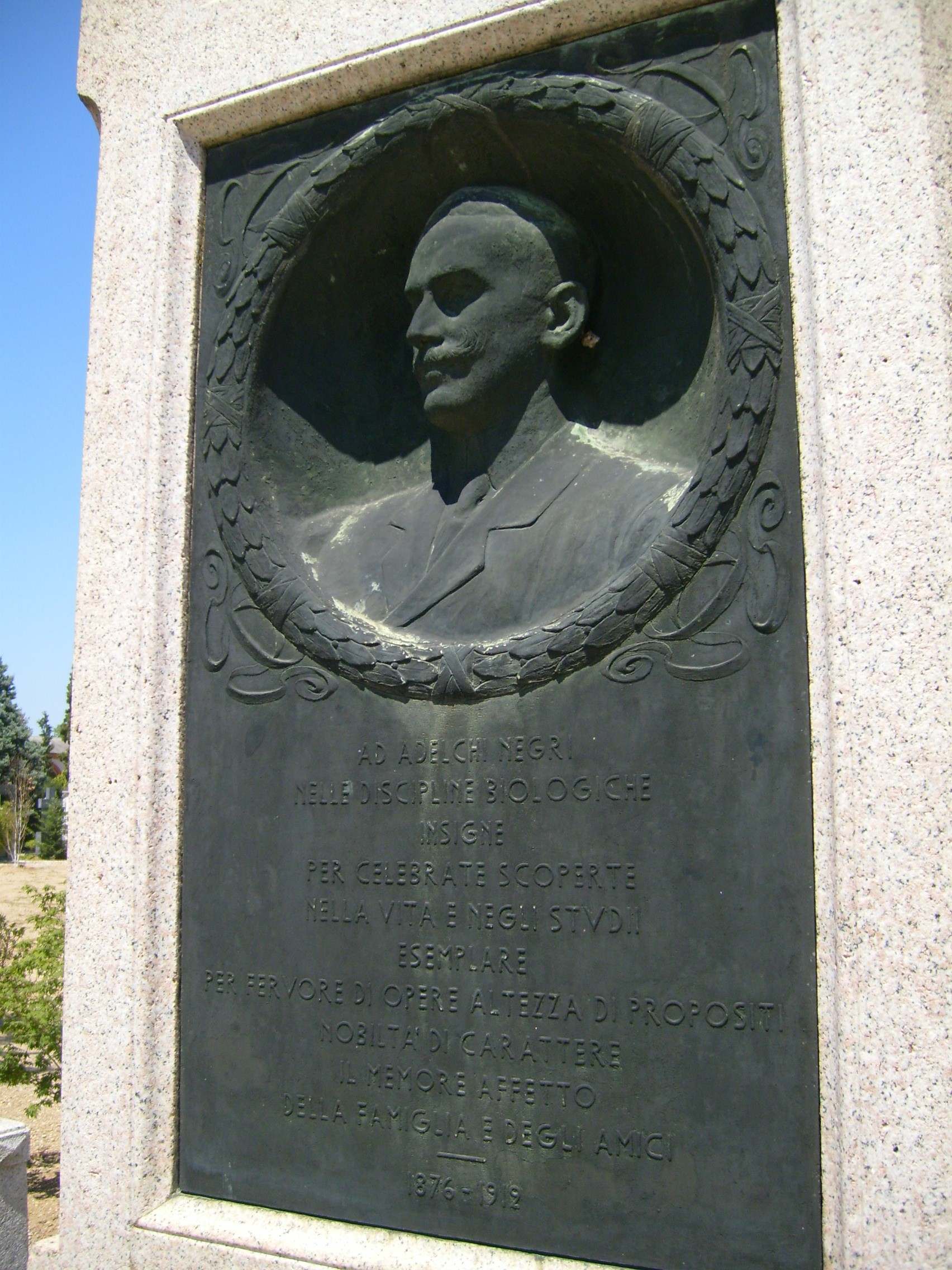 Adelchi Negri’s tomb, Monumental Cemetery, Pavia, Italy